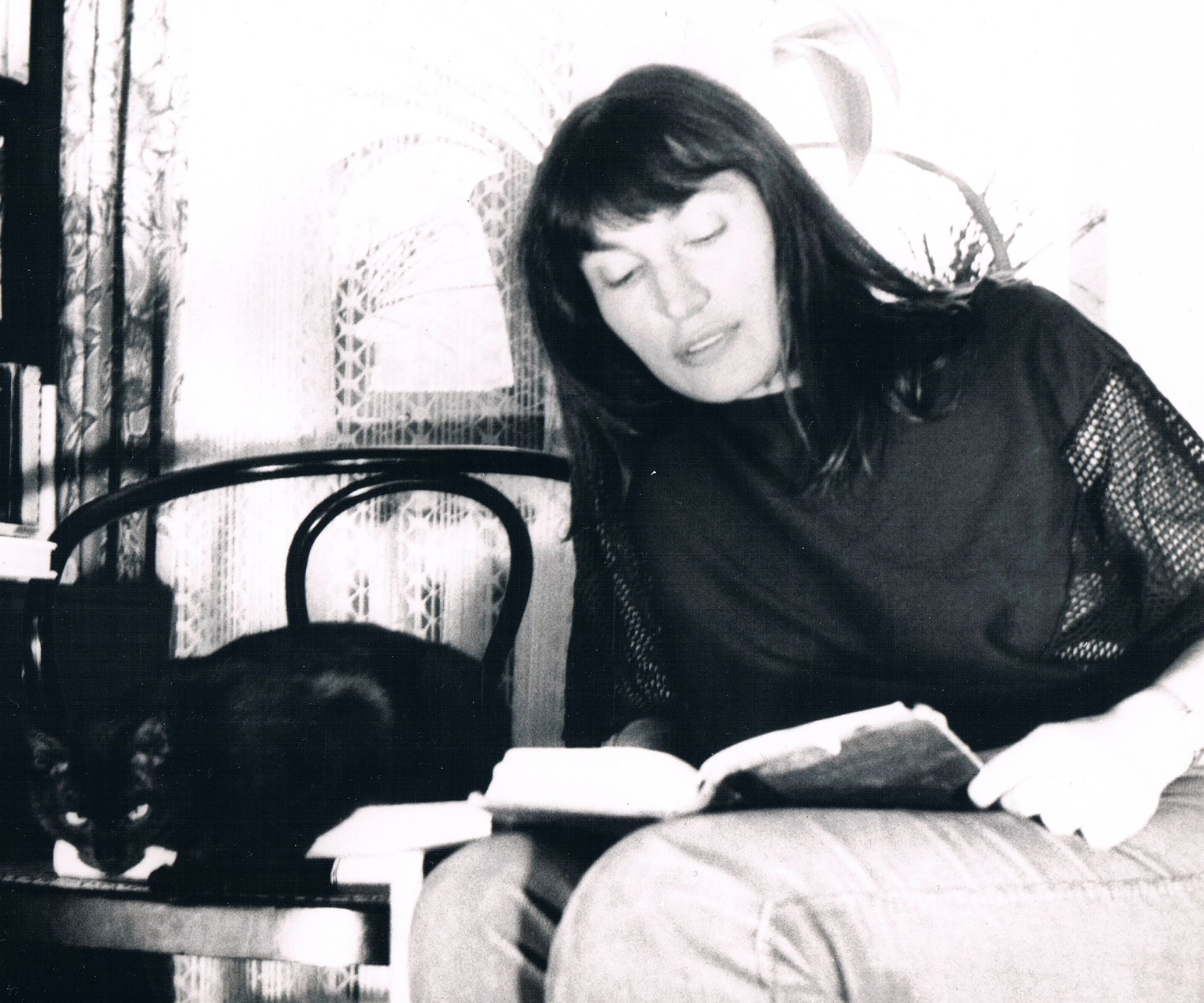 Anna Bojarska przy pracy. Obok kot Stroszek. Połowa lat osiemdziesiątych.